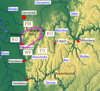 Odenwald Flasergranitoidzone mit benachbarten geologischen Formationen: Frankenstein-Massiv (FM), Rheingraben (RG), Weschnitzpluton (WP), Trommgranit (TG), Böllstein-Odenwald (BO), Reinheimer Bucht (RB)